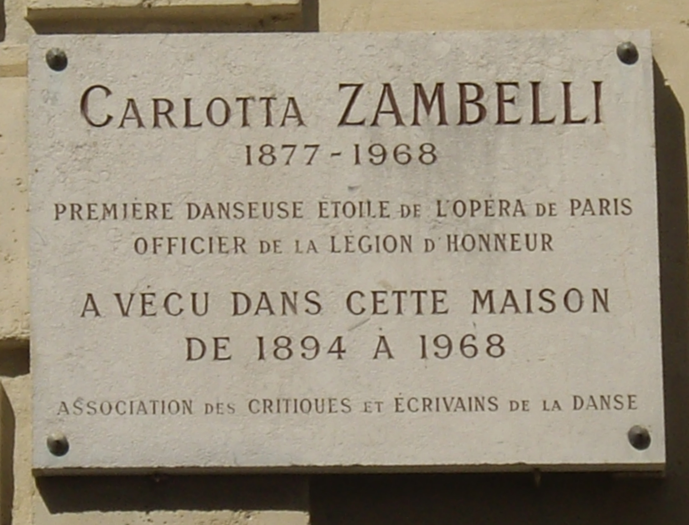 Plaque apposée au n° 2 de la rue Chauveau-Lagarde, Paris 8e, où vécut la danseuse Carlotta Zambelli (1875-1968) de 1898 à 1968.